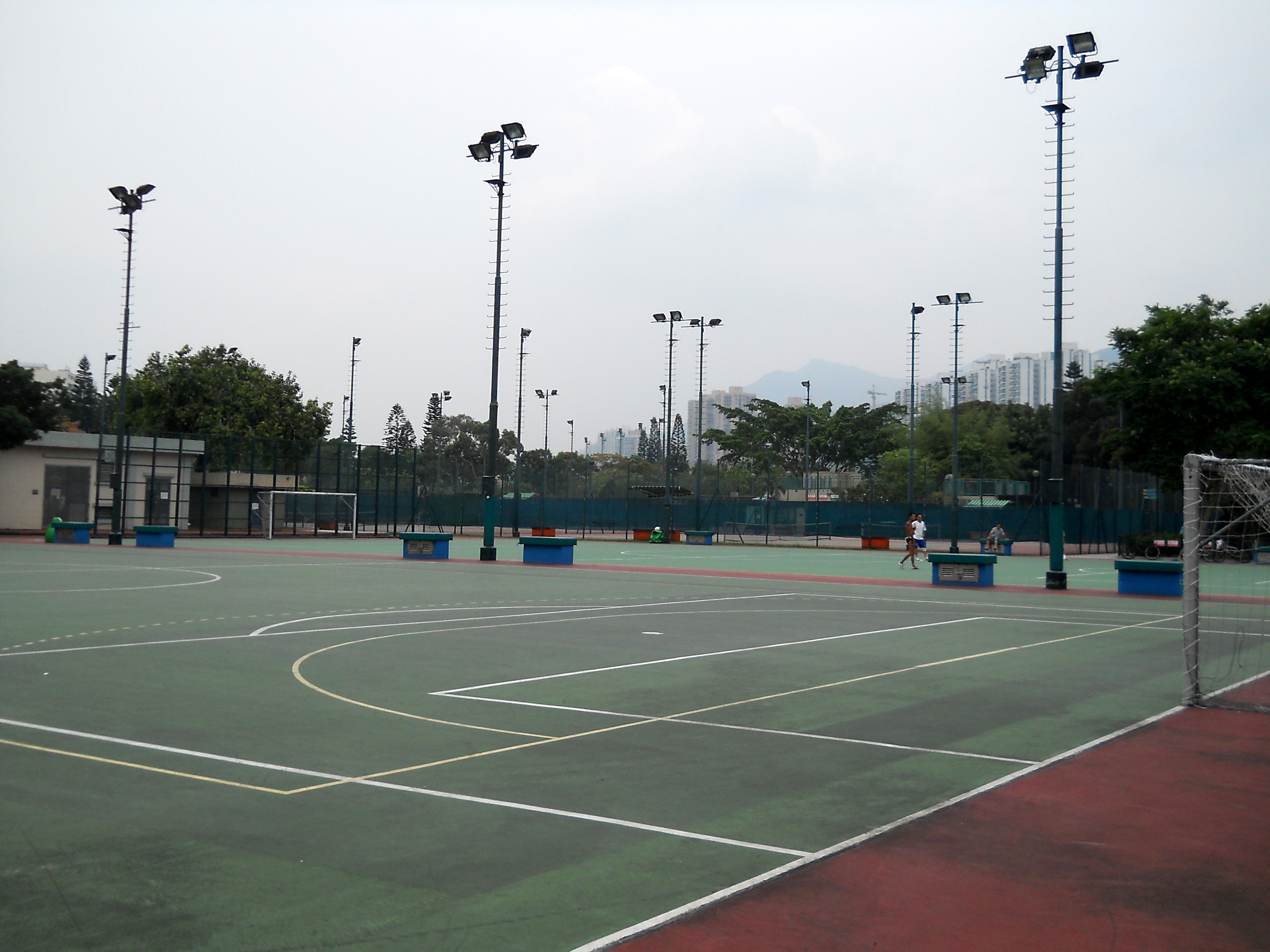 中文（香港）: 源禾遊樂場。